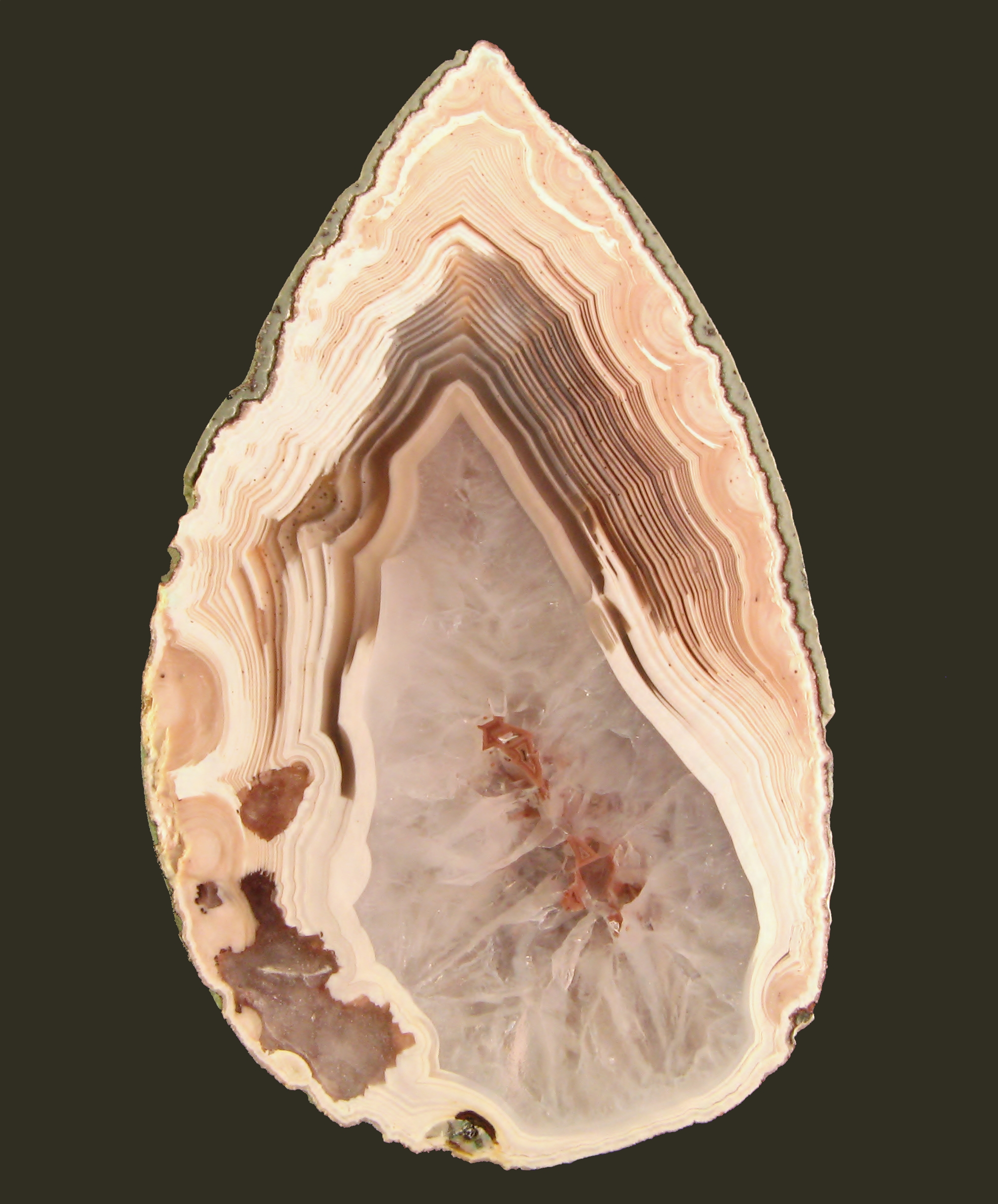 Achat-Mandel